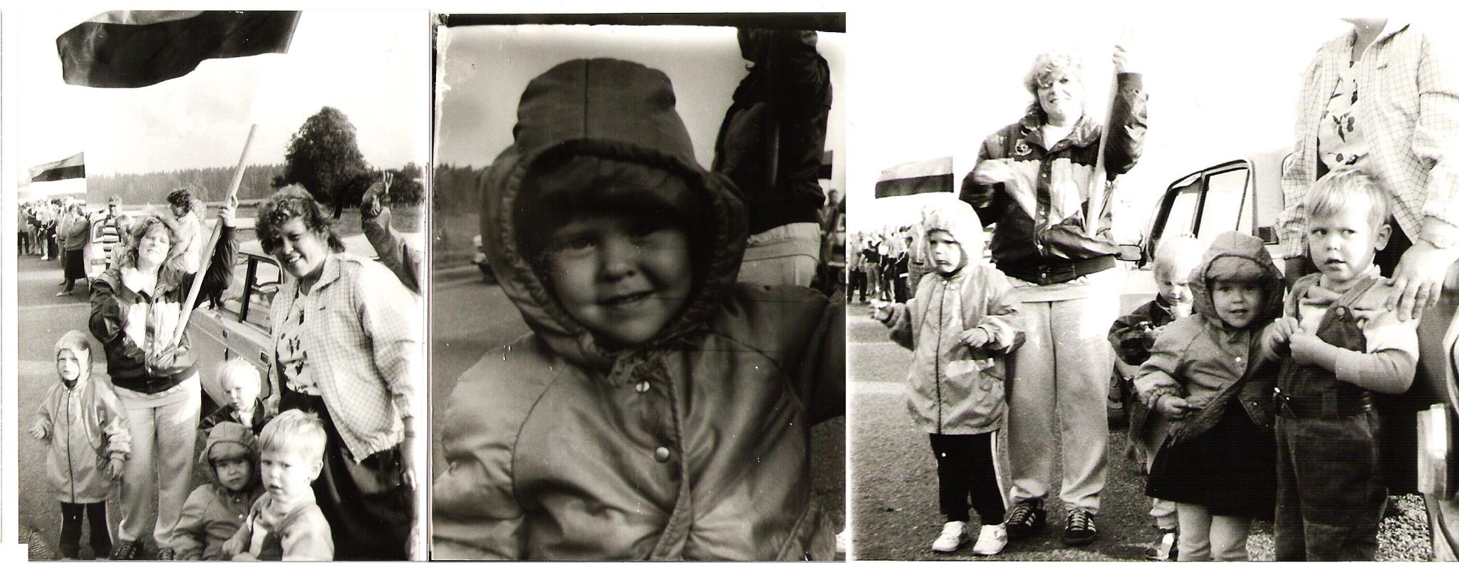 Balti kett. Perekond Vahula ja Janson